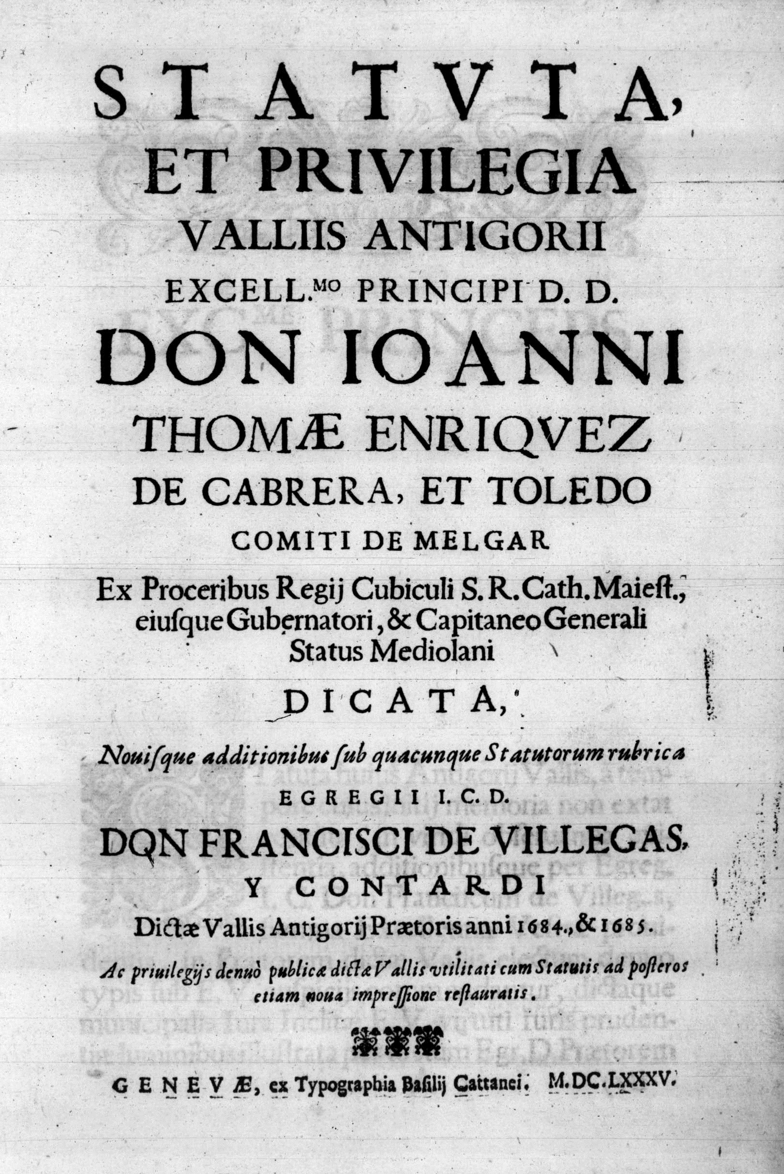 Frontespizio